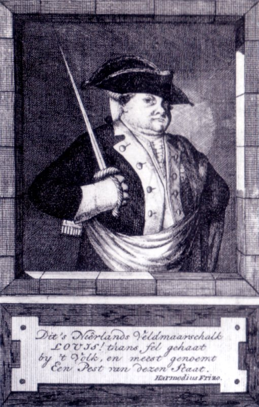 Duke of Brunswick-Wolfenbüttel Rijksprentenkabinet, Amsterdam